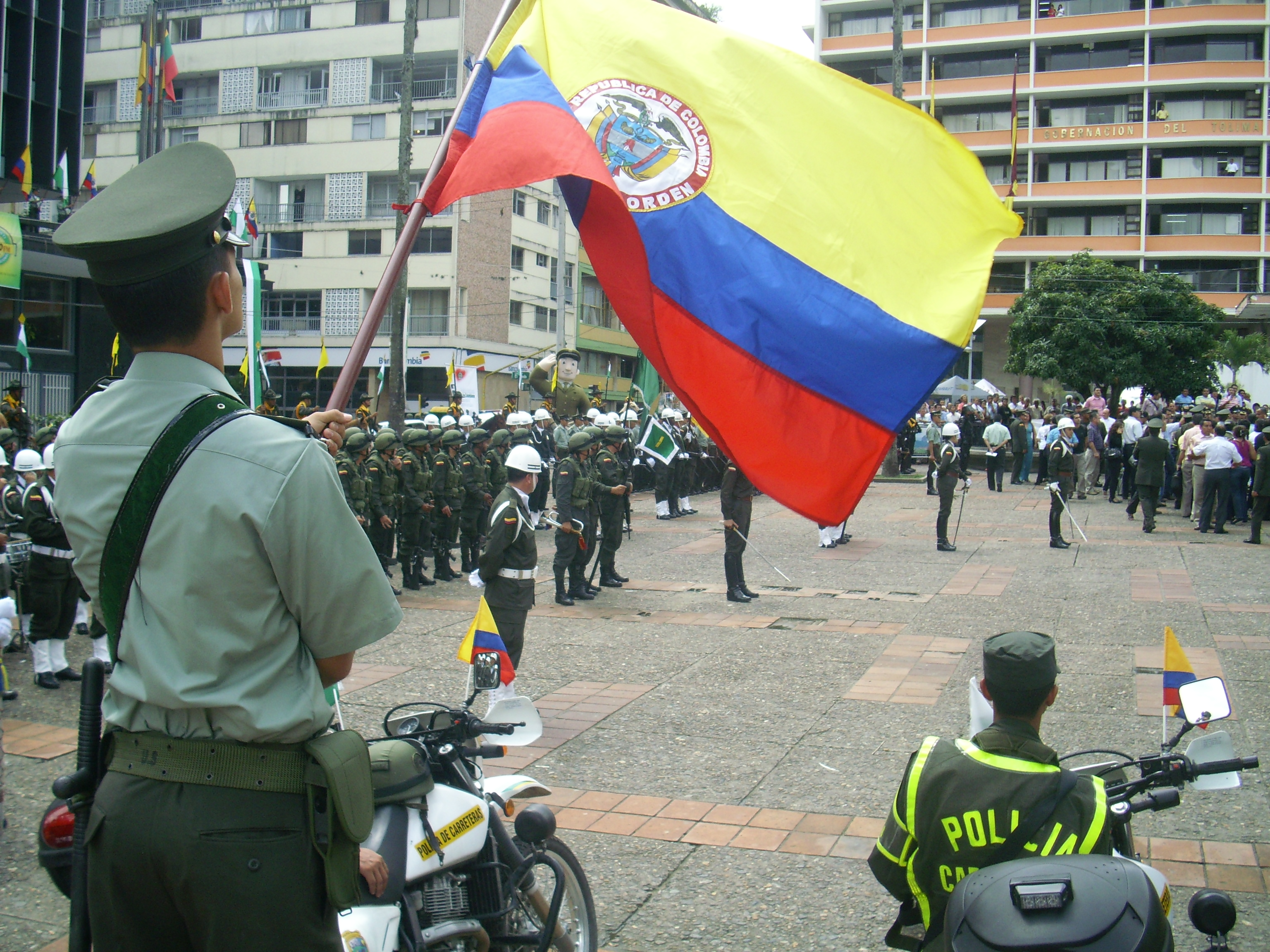 Hogar (location?)